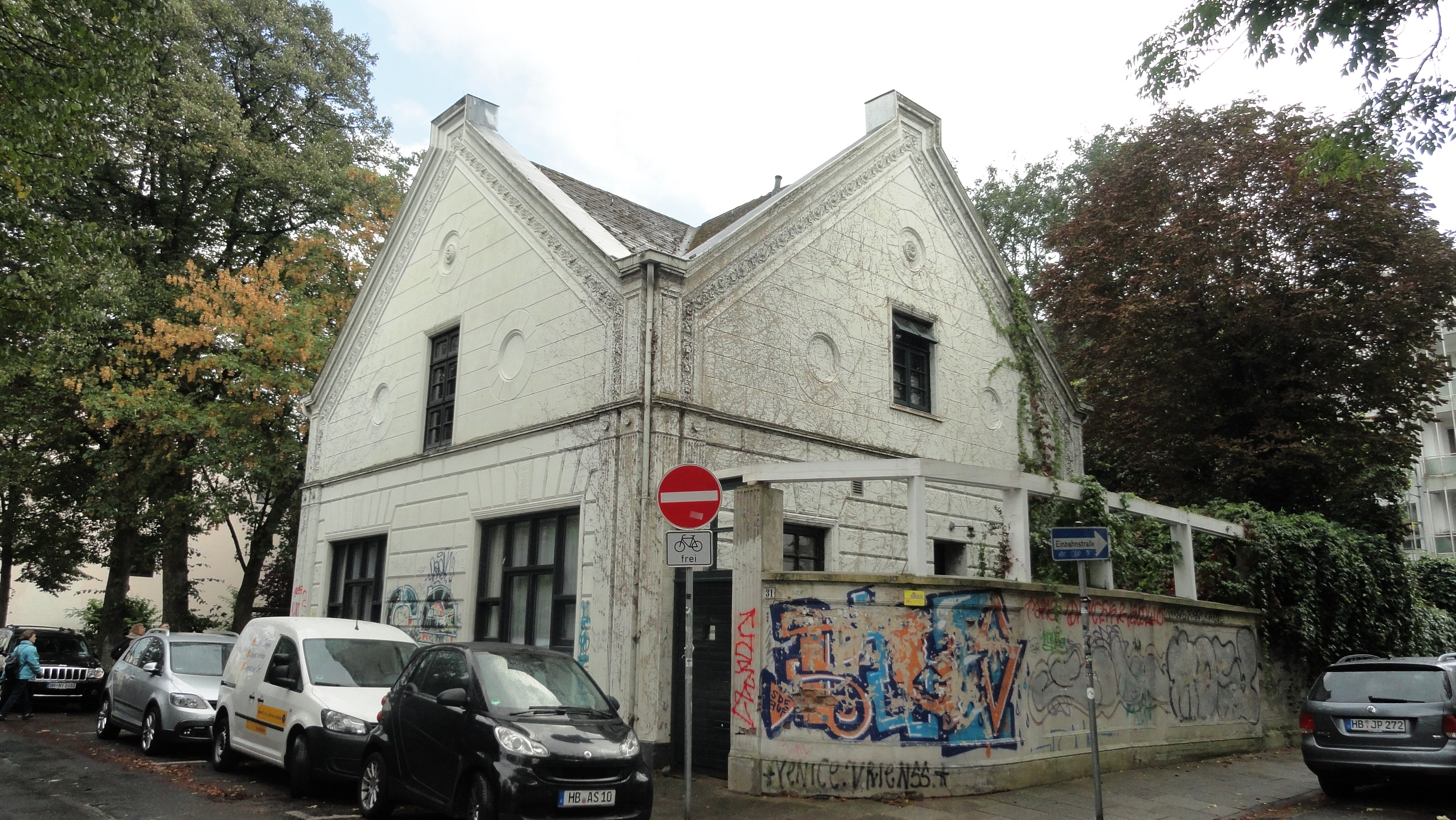 Remise der Villa Fritze in Bremen, Bleicherstraße 31Das abgebildete Objekt ist ein geschütztes Kulturdenkmal in der Freien Hansestadt Bremen, mit der Nr. 0191 beim Landesamt für Denkmalpflege registriert.